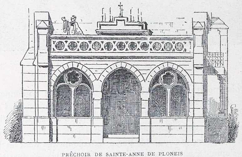 Le prêchoir de Sainte-Anne de Plonéis (dessin de M. Busnel dans "La Bretagne artistique, pittoresque et littéraire", 1881).